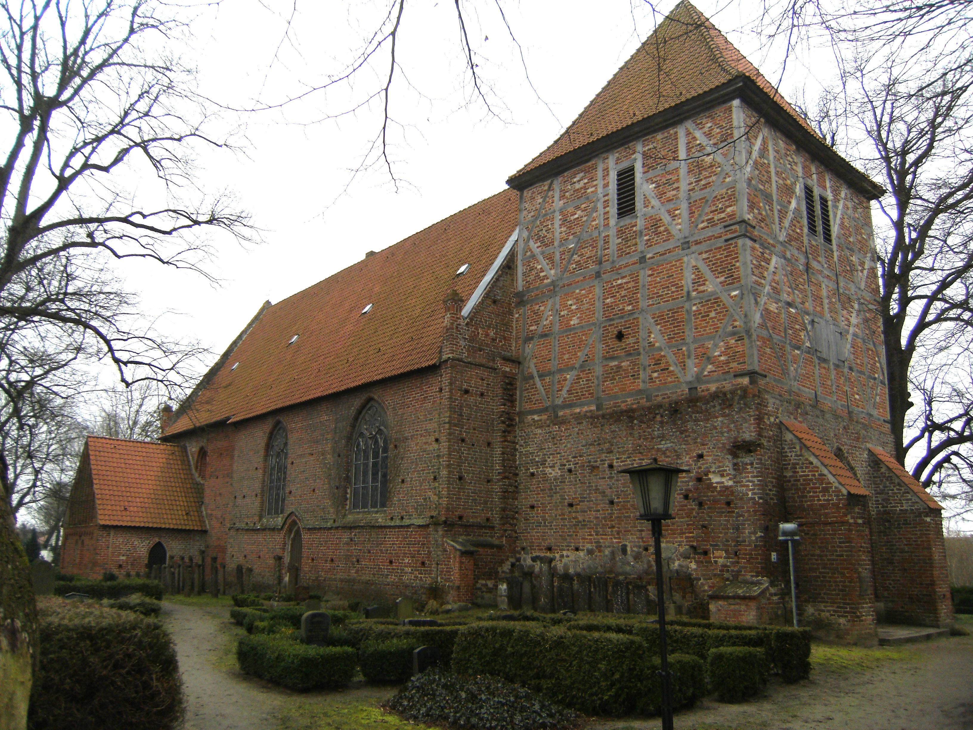 Kirche Neuenkirchen von NW